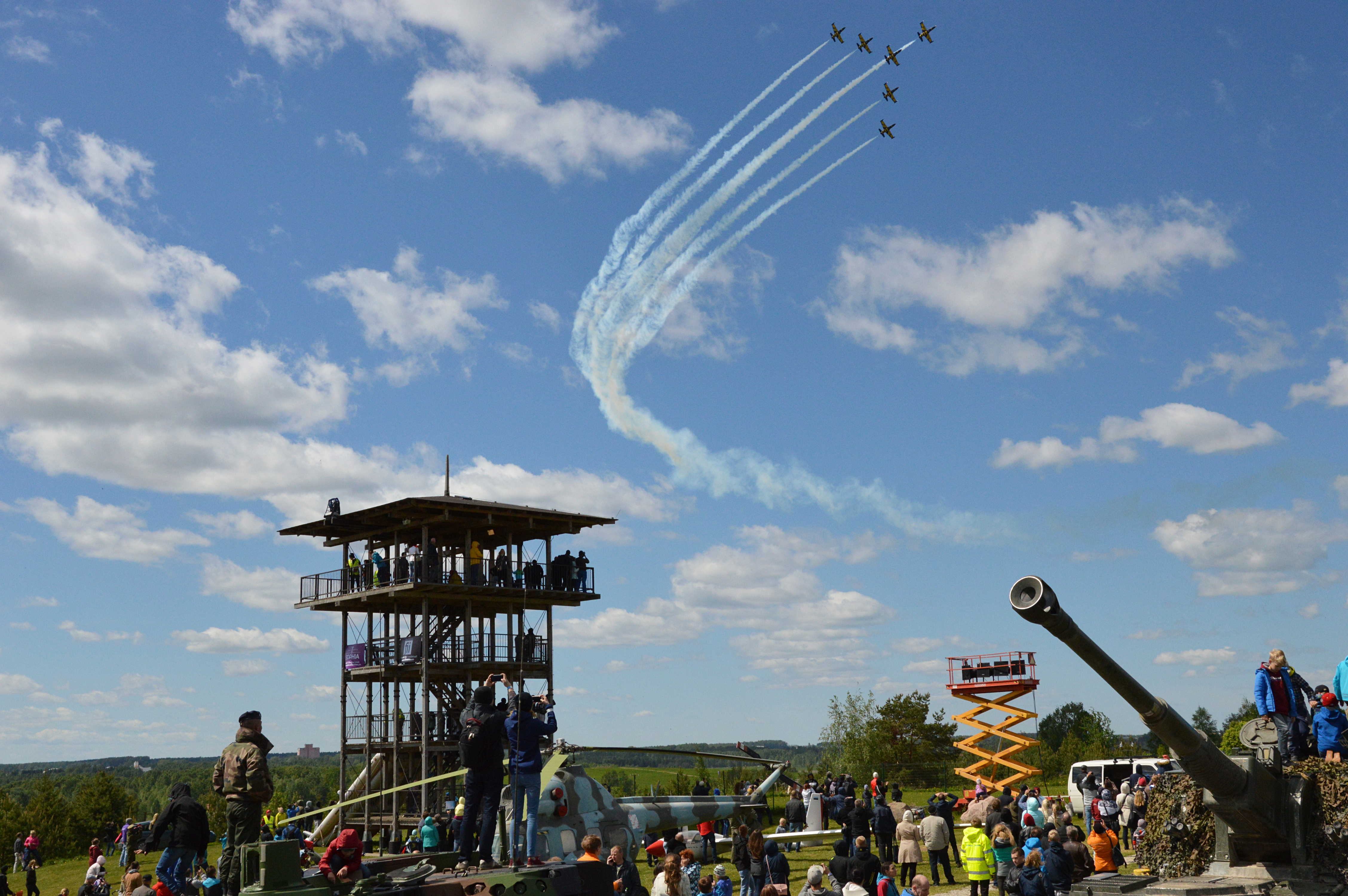 Eesti Lennupäevad 2017